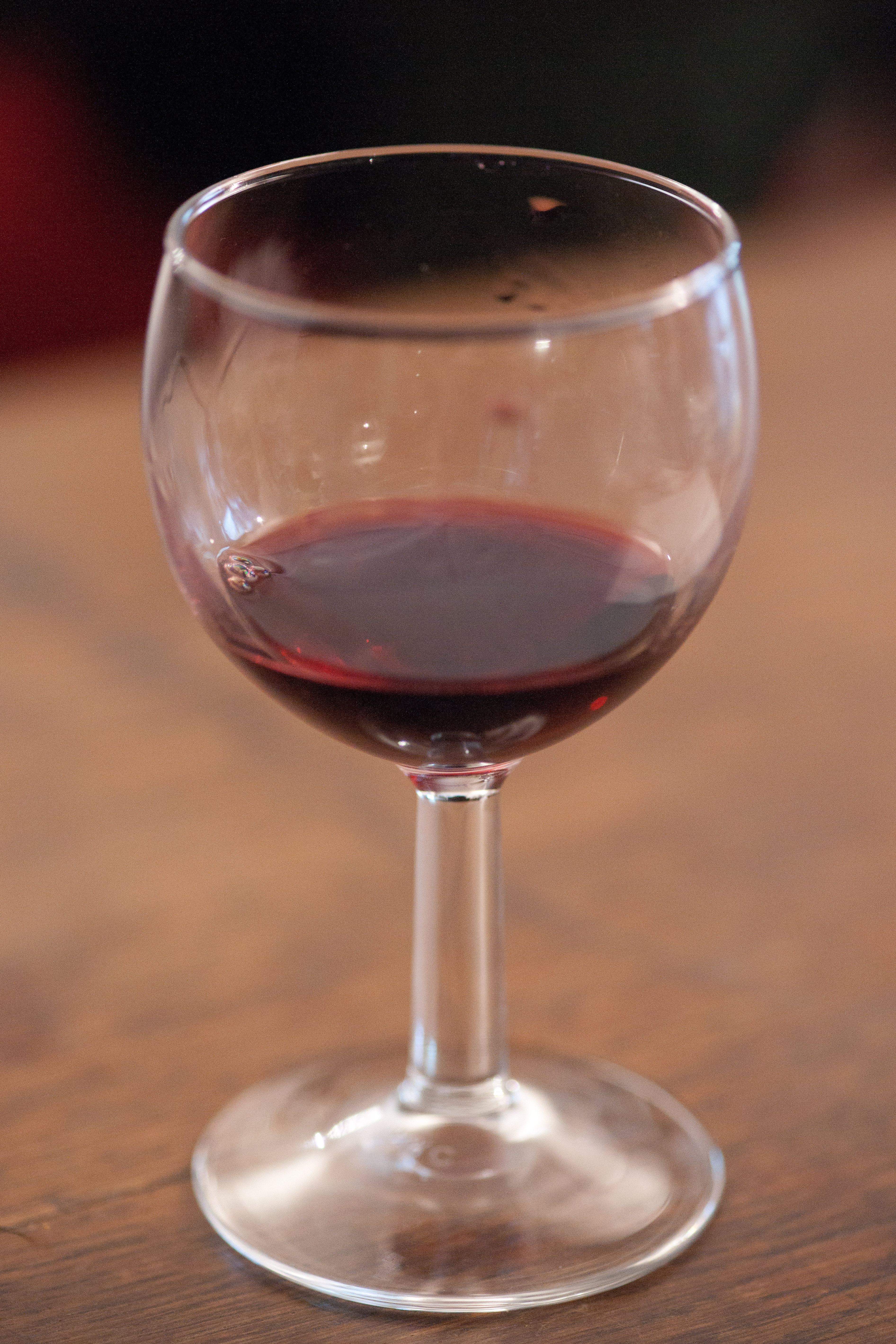 Verre de vin rouge